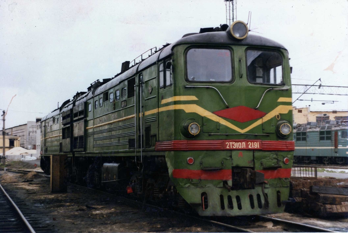 По состоянию на 07.2001 г. — депо Муром